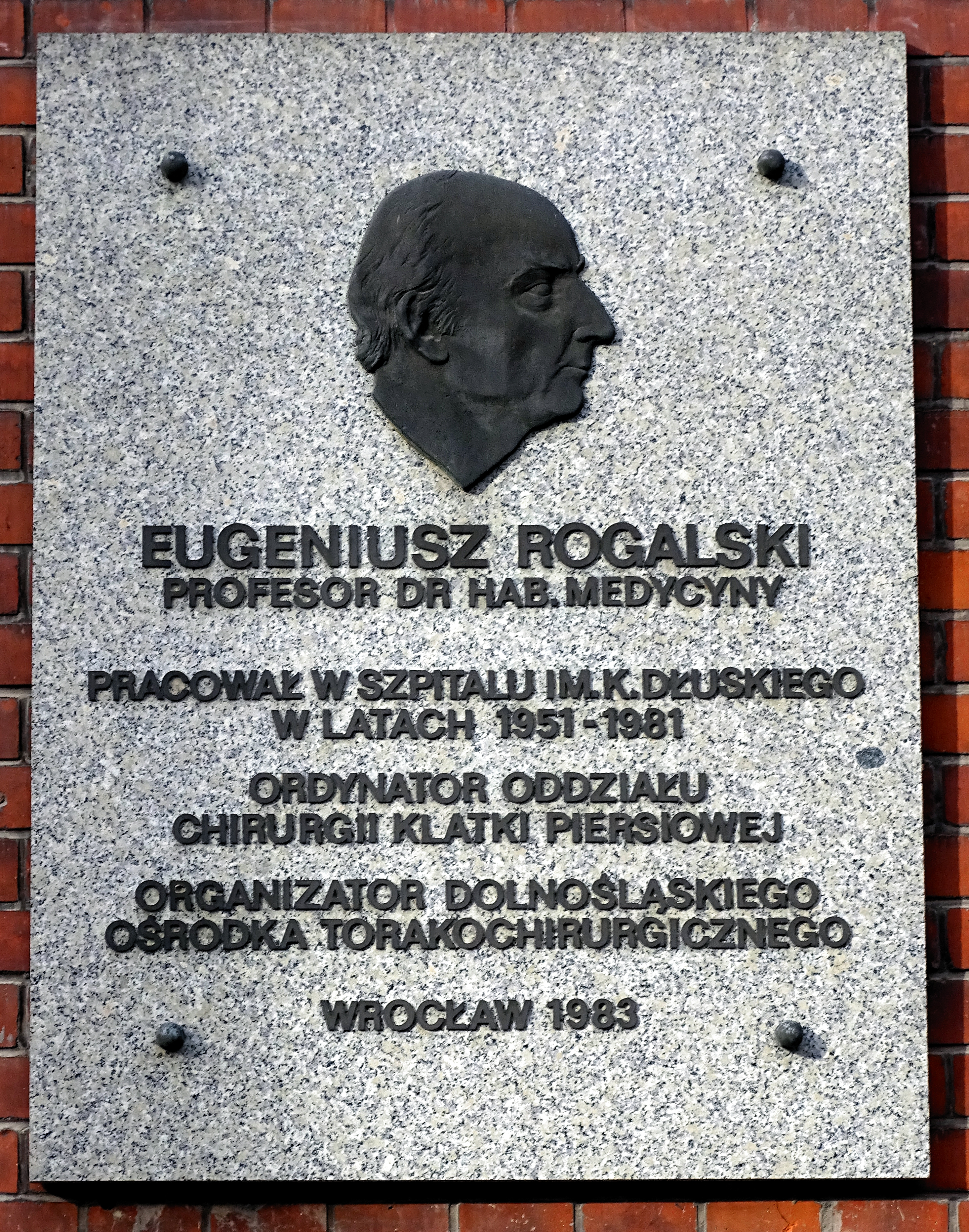 Eugeniusz Rogalski